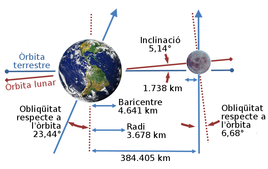 Sistema Terra-Lluna, diverses mesures.